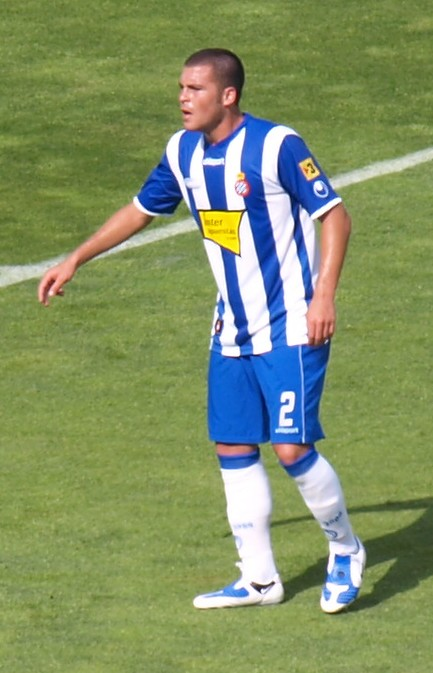 Javier Chica en el partido que enfrentó al RCD Español y al Málaga CF en el último partido de La Liga 2008/09 en el estadio Olímpico de Montjuic.